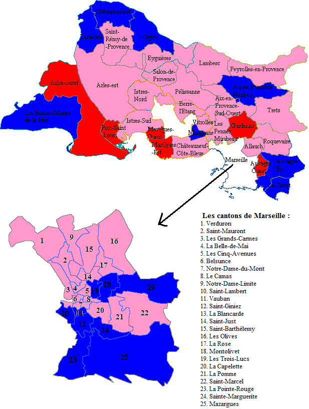 Couleurs politiques des cantons des Bouches-du-Rhône